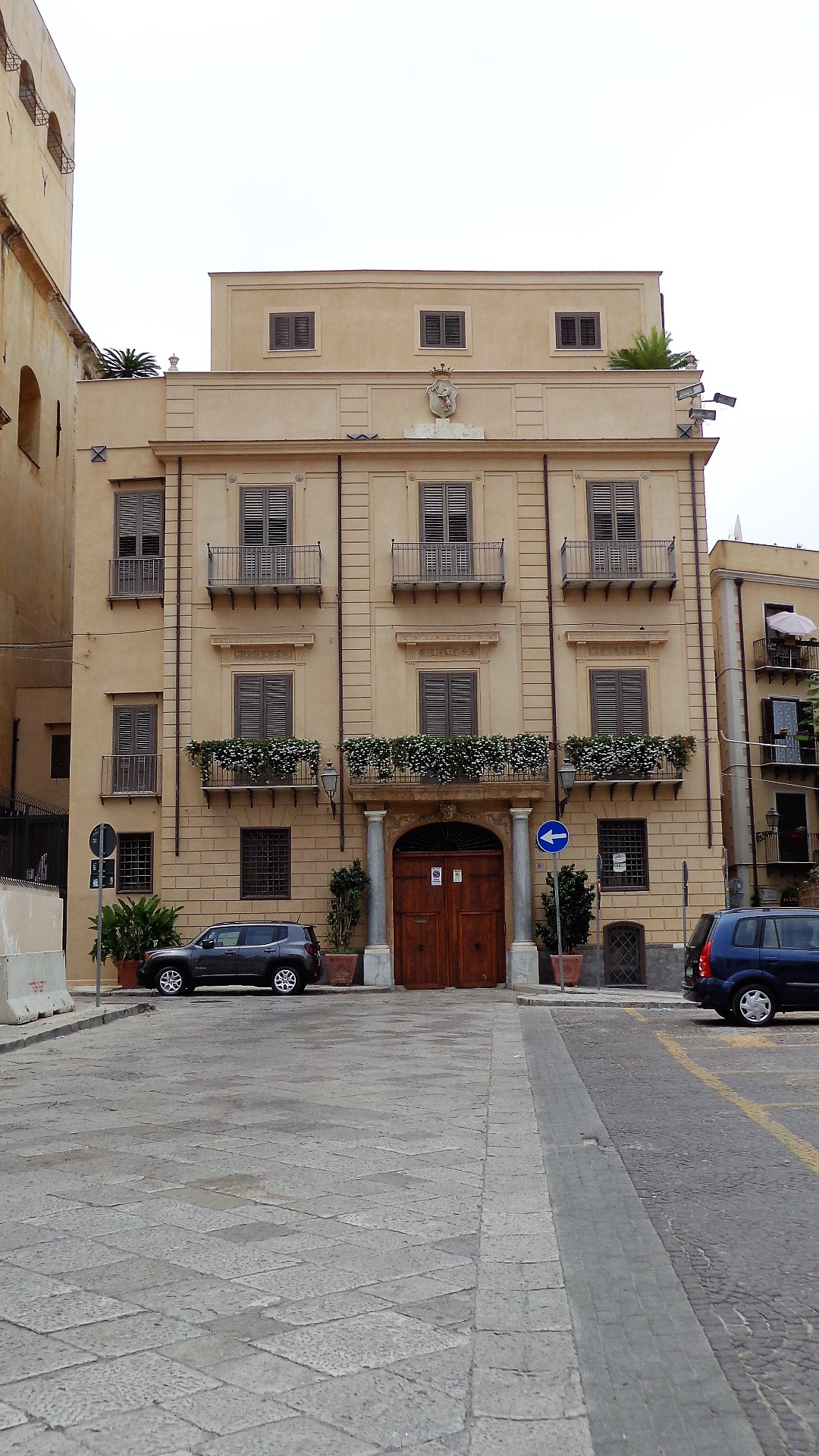 Facciata.